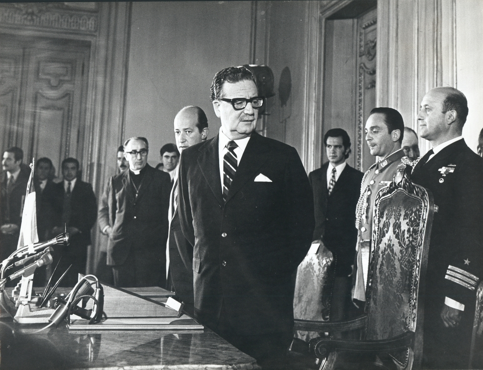 28/09/1971. Junto a autoridades durante firma del pago por Nacionalización del Cobre